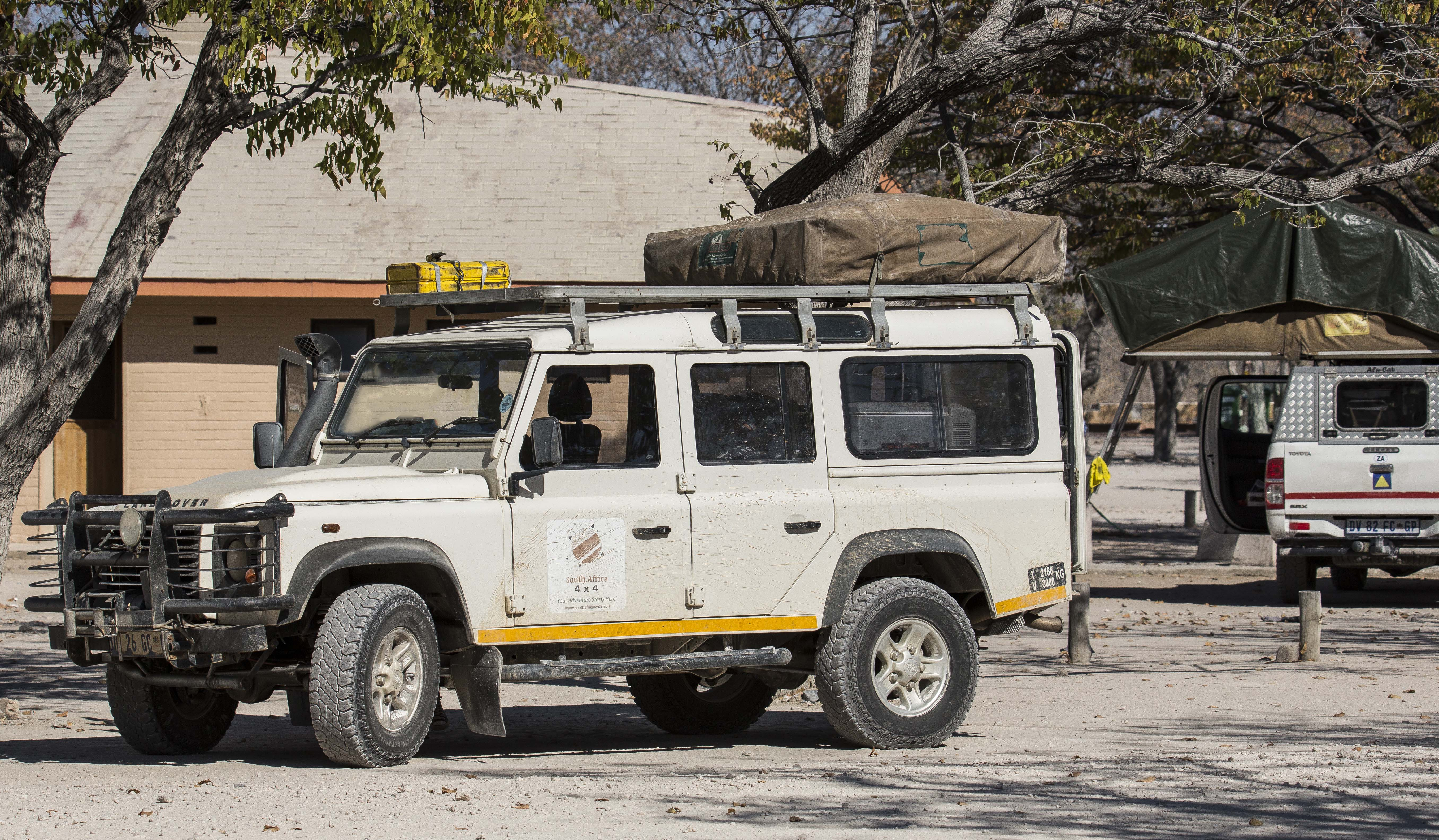 Land Rover Defender als touristischer Mietwagen in Namibia